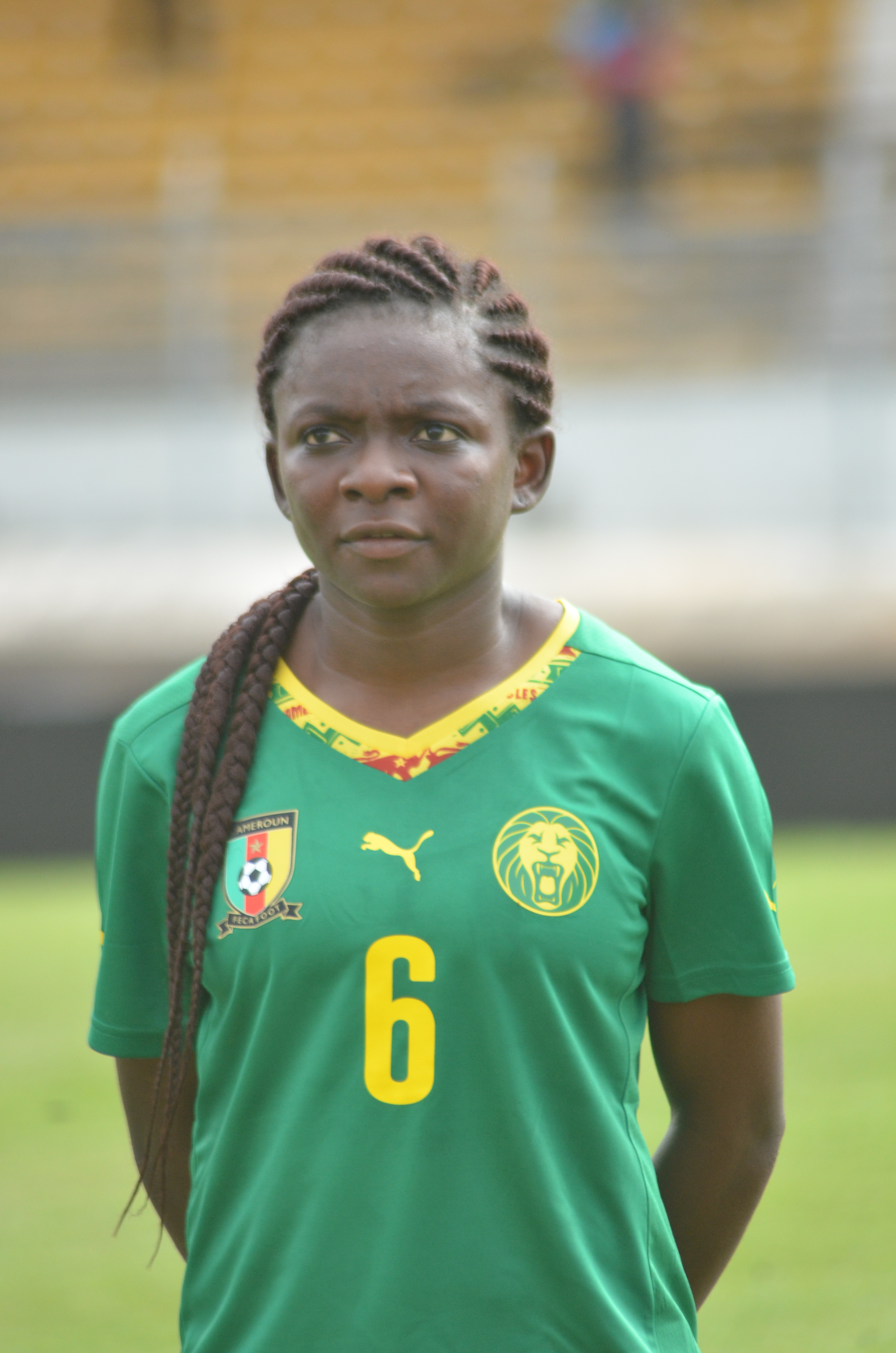 Milieu de terrain de l'équipe de football du Cameroun